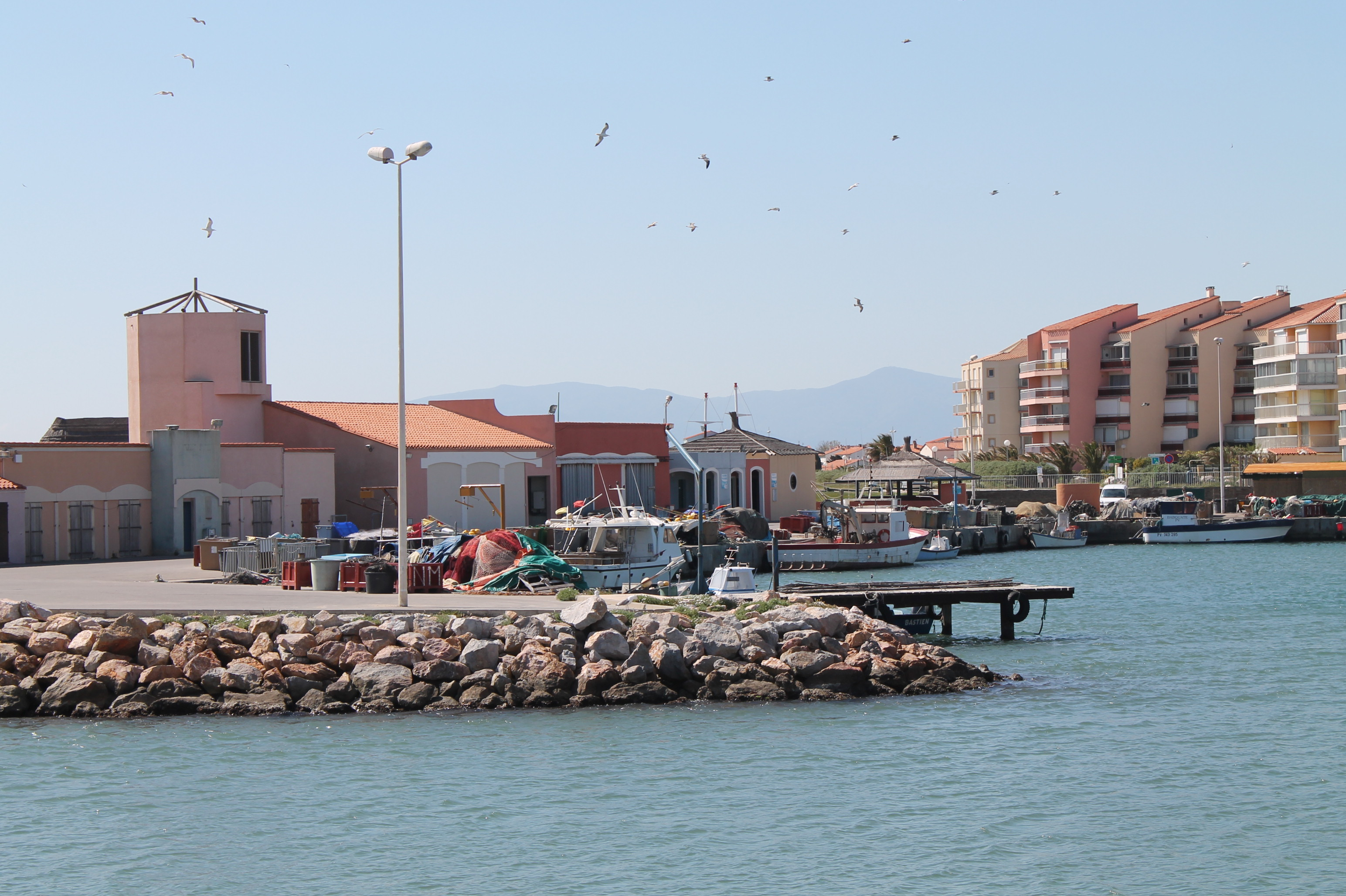 Le port de pêche